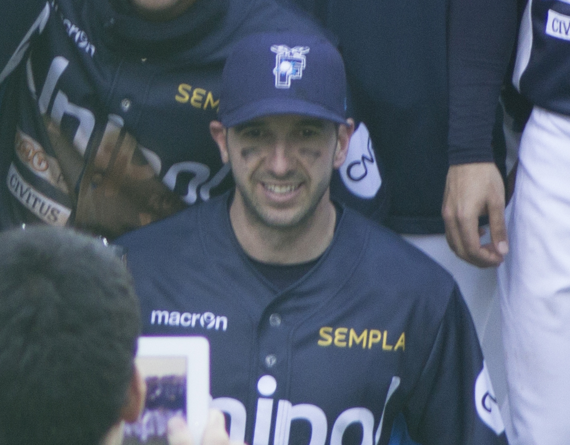 La Fortitudo Bologna al termine della finale di Coppa Italia 2012 vinta su Rimini, disputata il 30 marzo 2013. Foto scattata da me dagli spalti con obiettivo 70-300.